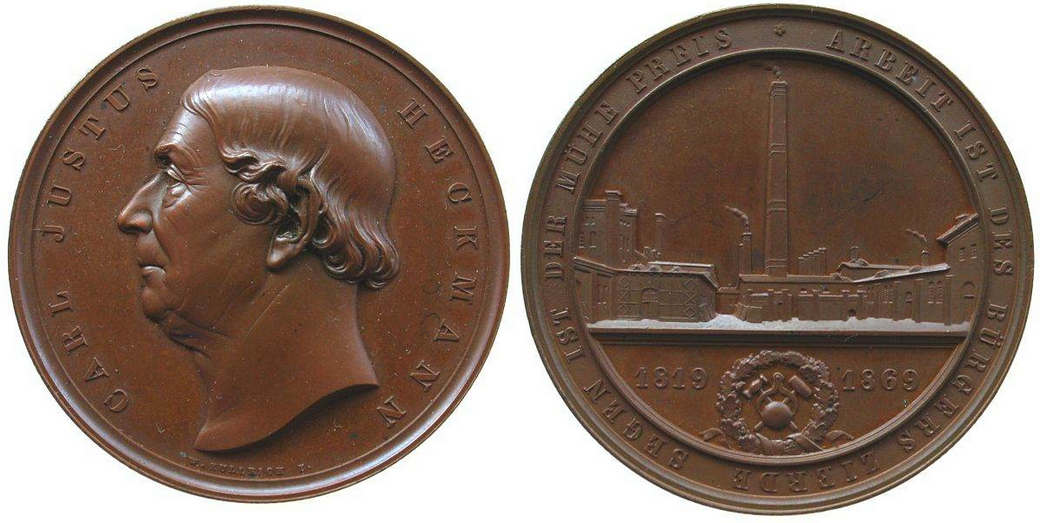 Medaille 1869 Berlin Bronze Carl Justus Heckmann (1786-1878), Industrieller, Berlin, auf das 50jährige Jubiläum des Walzwerkes mit der Inschrift Rückseite SEGEN IST DER MÜHE PREIS - ARBEIT IST DES BÜRGERS ZIERDE 1819 - 1869 (Münzenversand Claus & Barbara Hardelt GbR)